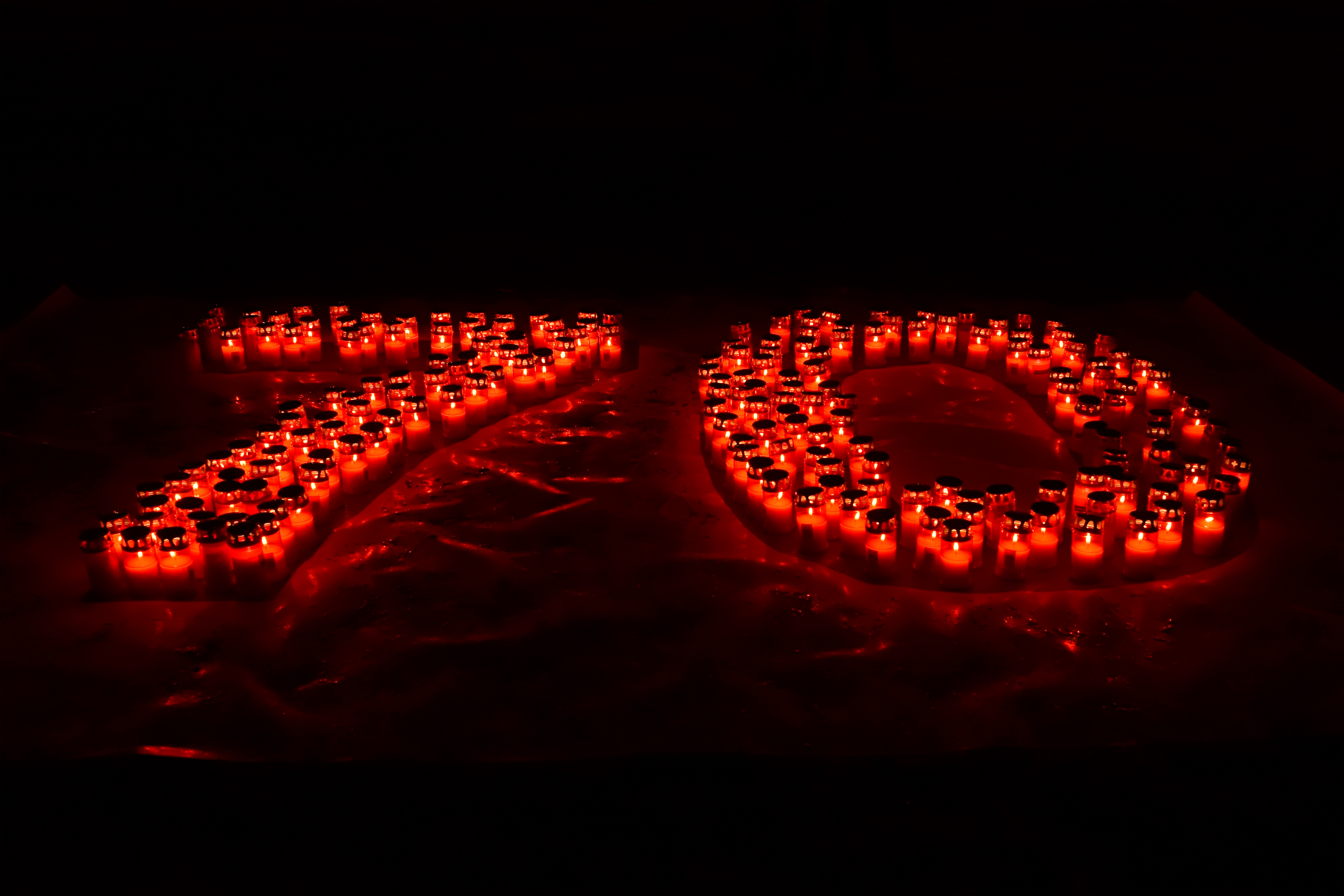 Gedenkkundgebung 70 Jahre Befreiung von Auschwitz am 27. Jänner 2015, dem Internationalen Holocaust-Gedenktag.